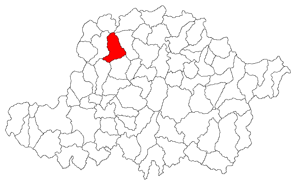 Categorie:Hărţi ale judeţului Arad